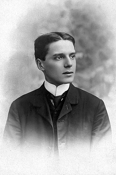 Giovanni MARTINOLICH